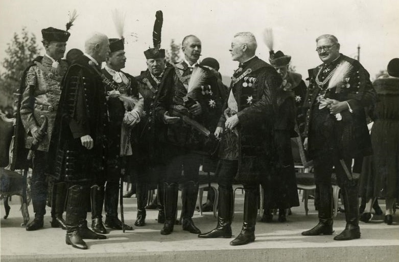 Erzsébet királyné emlékművének leleplezési ünnepsége, 1932. szeptember 25. Balról jobbra: báró Wlassics Gyula, Keresztes-Fischer Ferenc, Almásy László, Zsitvay Tibor, Károlyi Gyula, Karafiáth Jenő.